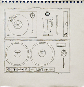 Skizze für Permance mit Eisschallplatten, Claudia Märzendorfer